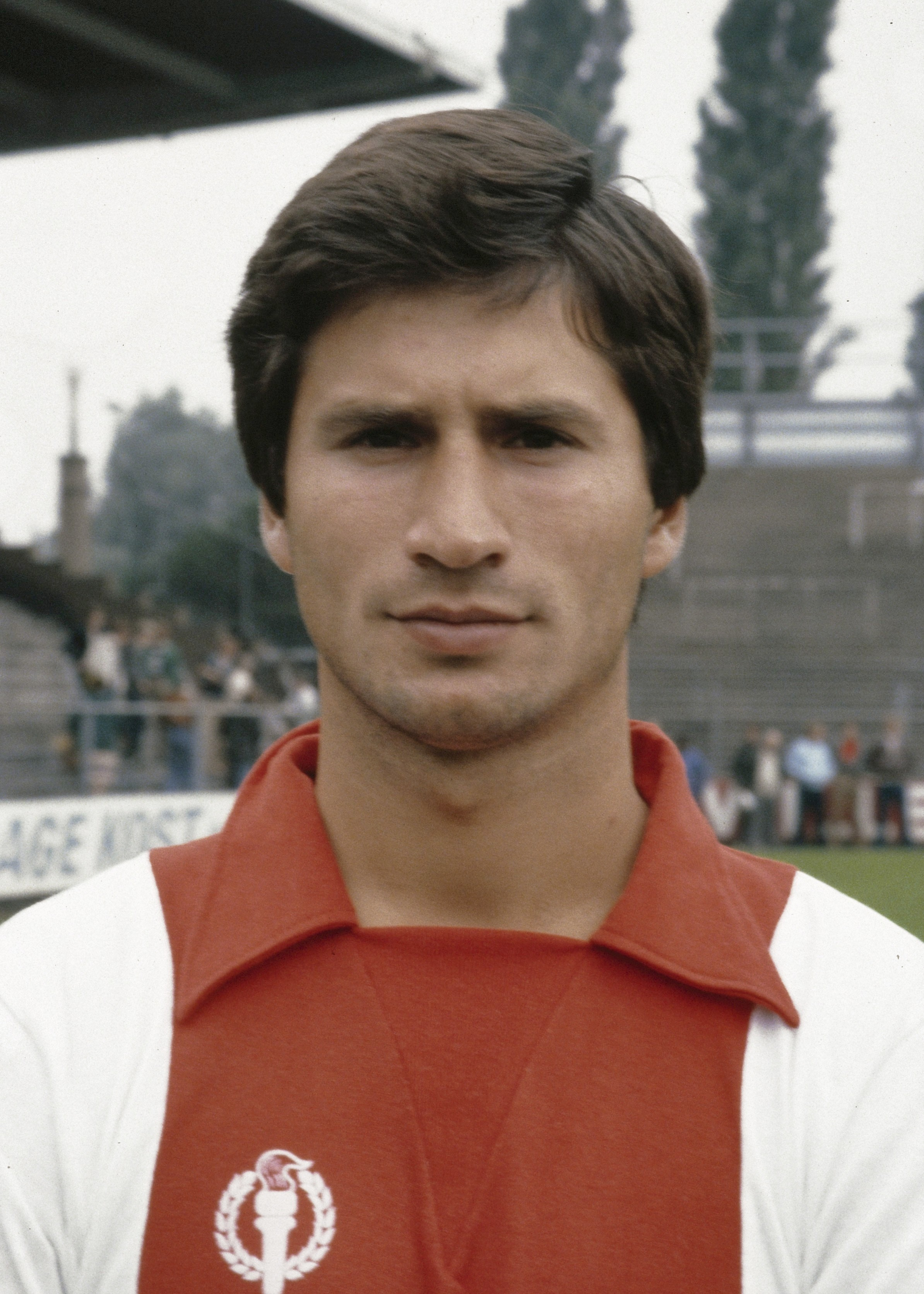 Presentatie Ajax selectie 1979/1980, Tscheu La Ling op 24 juli 1979.